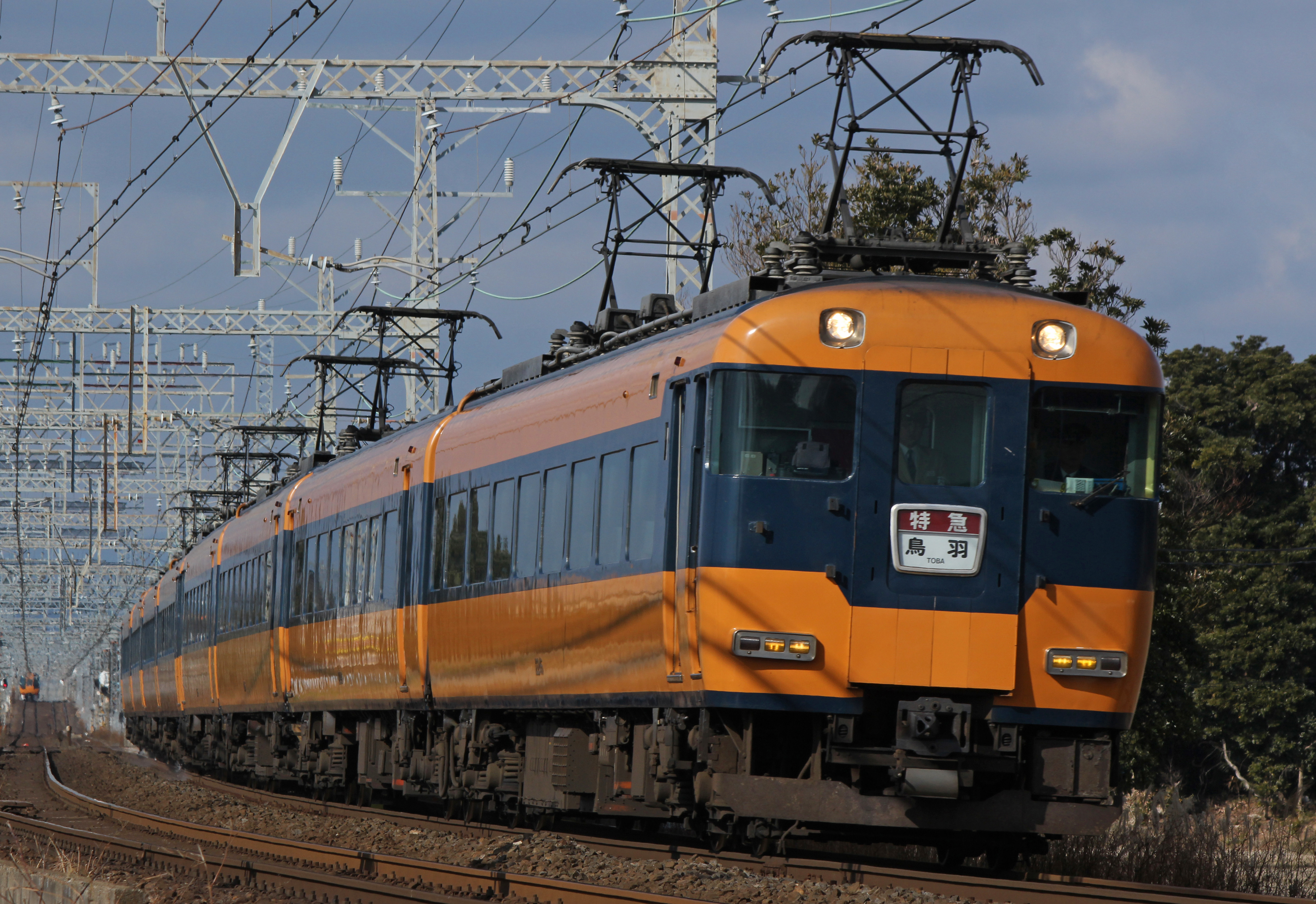 近鉄12200系 山田線 斎宮駅-漕代駅間